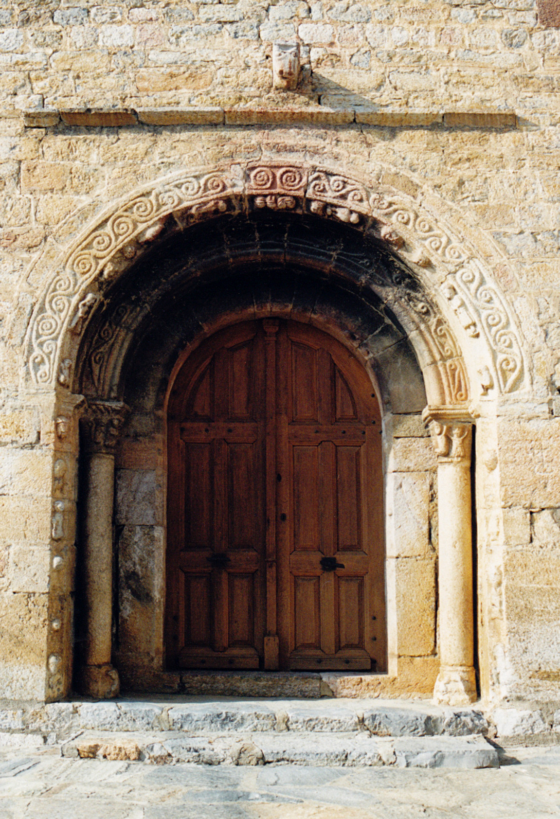 Espagne - Basse Cerdagne - Église Sainte-Marie d'All